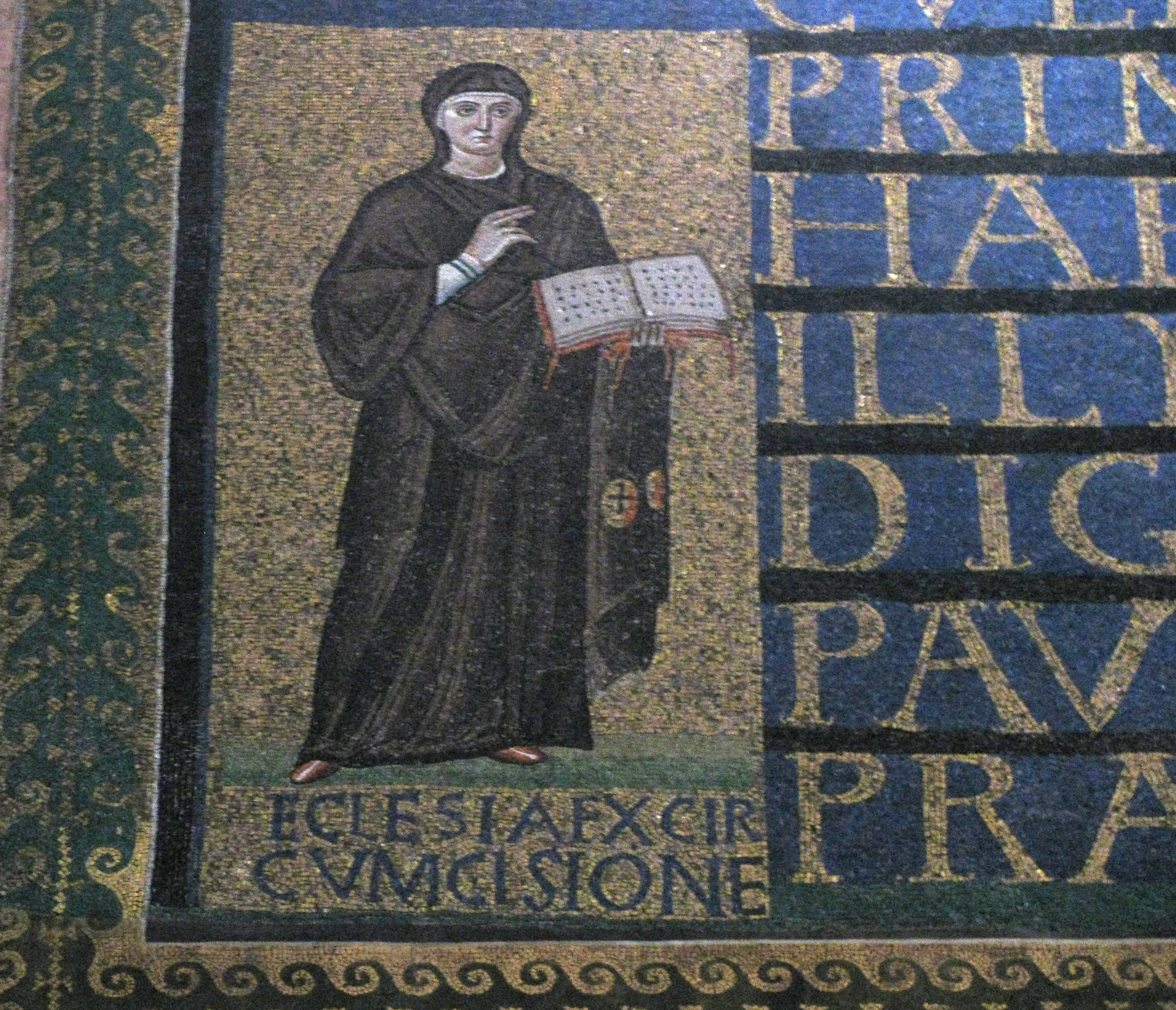 Eglise de S. Sabina, Aventin, Rome. Moniale représentant l'Eglise des circoncis, détail gauche de la mosaïque byzantine au-dessus de l'entrée principale